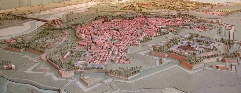 Photo du plan en relief de Perpignan. (Perpignan, Casa Xanxo)